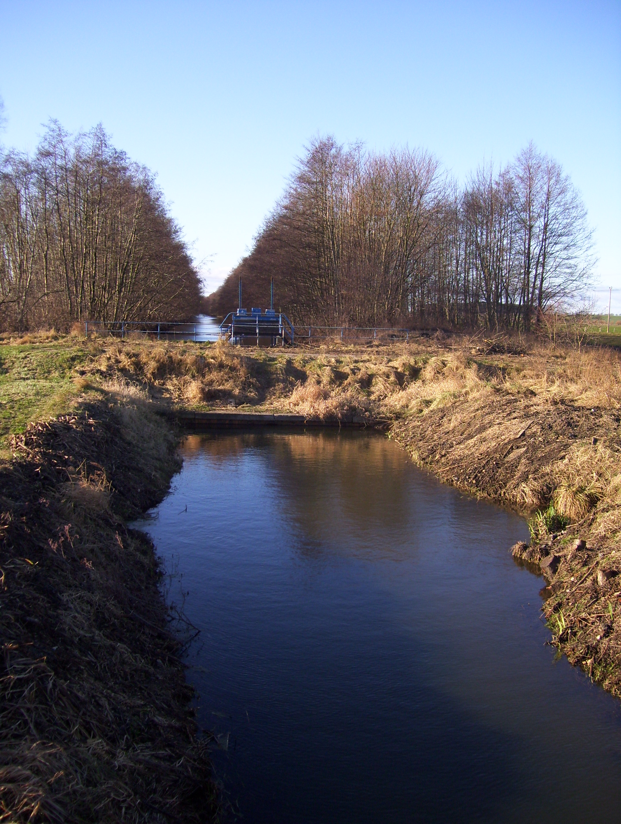 Ziese, Wehr bei Lodmannshagen, Gemeinde Neu Boltenhagen